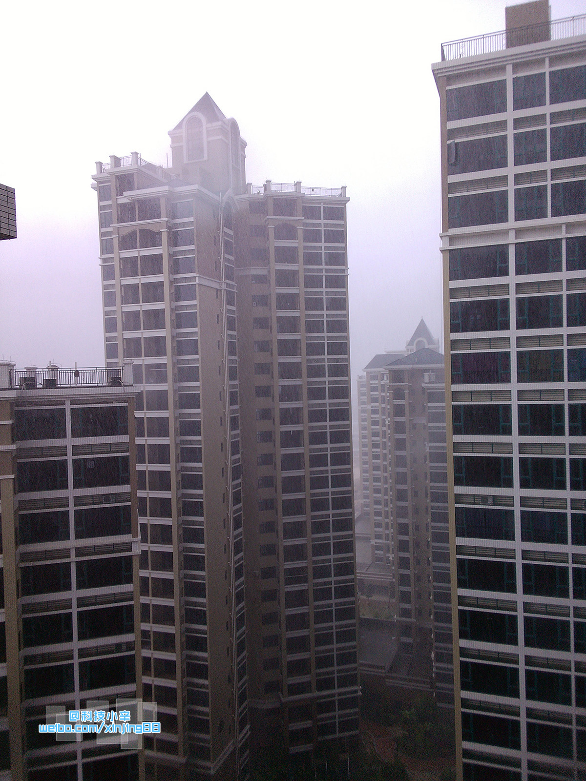 从高处看 大雨中 德洲城的楼房 --- By 科技小辛